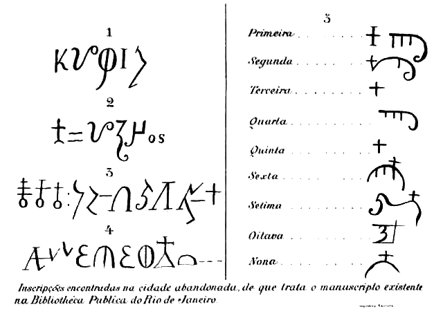 Рукопись 512 (Документ 512) — архивная рукопись, относящаяся к колониальному периоду истории Бразилии, в настоящее время хранится в запаснике Национальной библиотеки Рио-де-Жанейро. В тексте приводятся скопированные бандейрантами четыре надписи, выполненные неизвестными буквами или иероглифами: 1) с портика главной улицы; 2) с портика храма; 3) с каменной плиты, закрывавшей вход в пещеру у водопада; 4) с колоннады в загородном доме. Приводится также изображение девяти знаков на каменных плитах